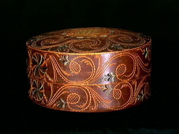 Øskje datert 1819, skåret av John Hansen Budalsplads. Diameter 30 cm. Foto Anne-Lise Reinsfelt/Norsk Folkemuseum, NF.1929-0882.